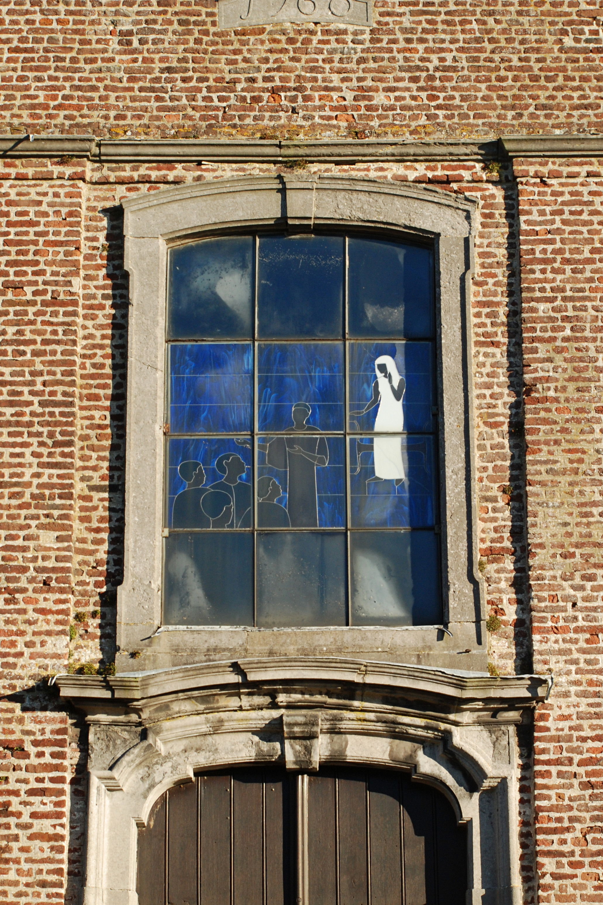 Belgique - Brabant wallon - Genappe - Glabais - Église Saint-Pierre